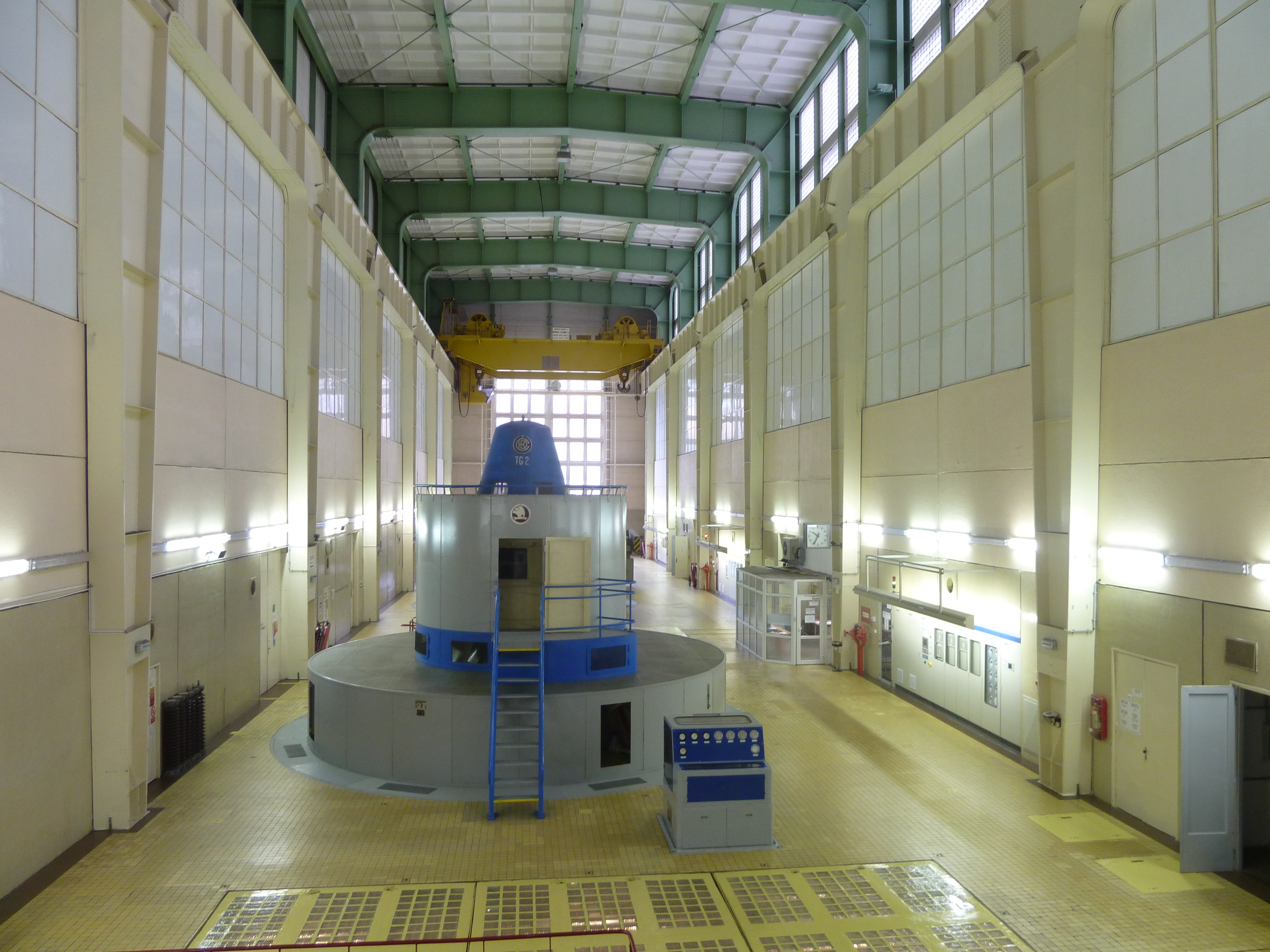 Hala s generátory ve vodní elekrárně Orlík